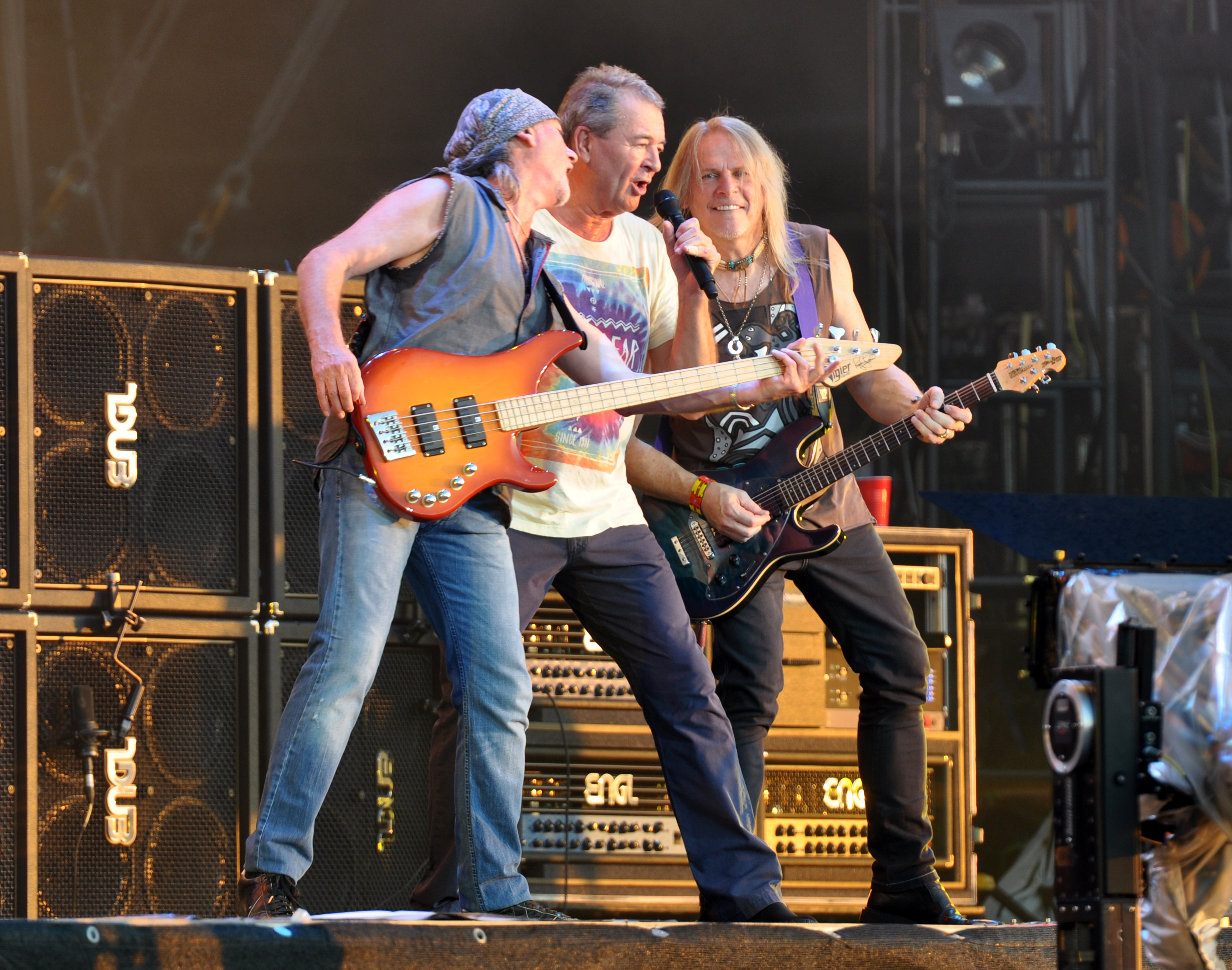 Deep Purple at Wacken Open Air 2013